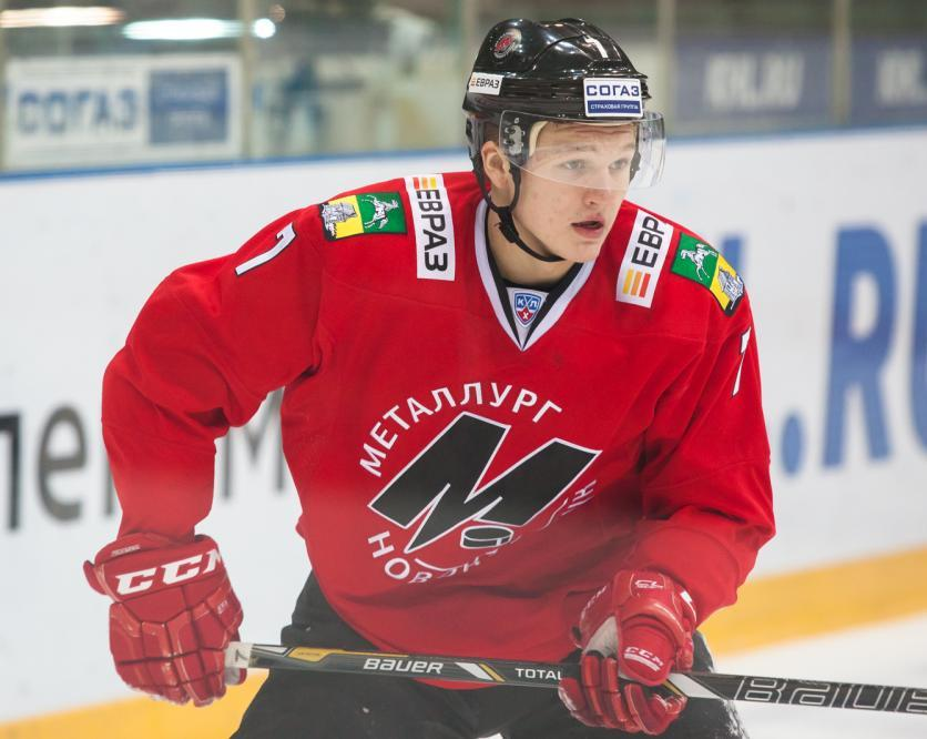 Нападающий новокузнецкого «Металлурга» Кирилл Капризов во время матча чемпионата КХЛ против ярославского «Локомотива» 29 сентября 2015 года.